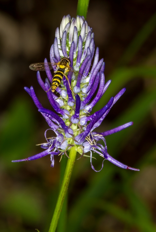 Raggaschlucht: Schwebfliege auf Steirischer Teufelskralle